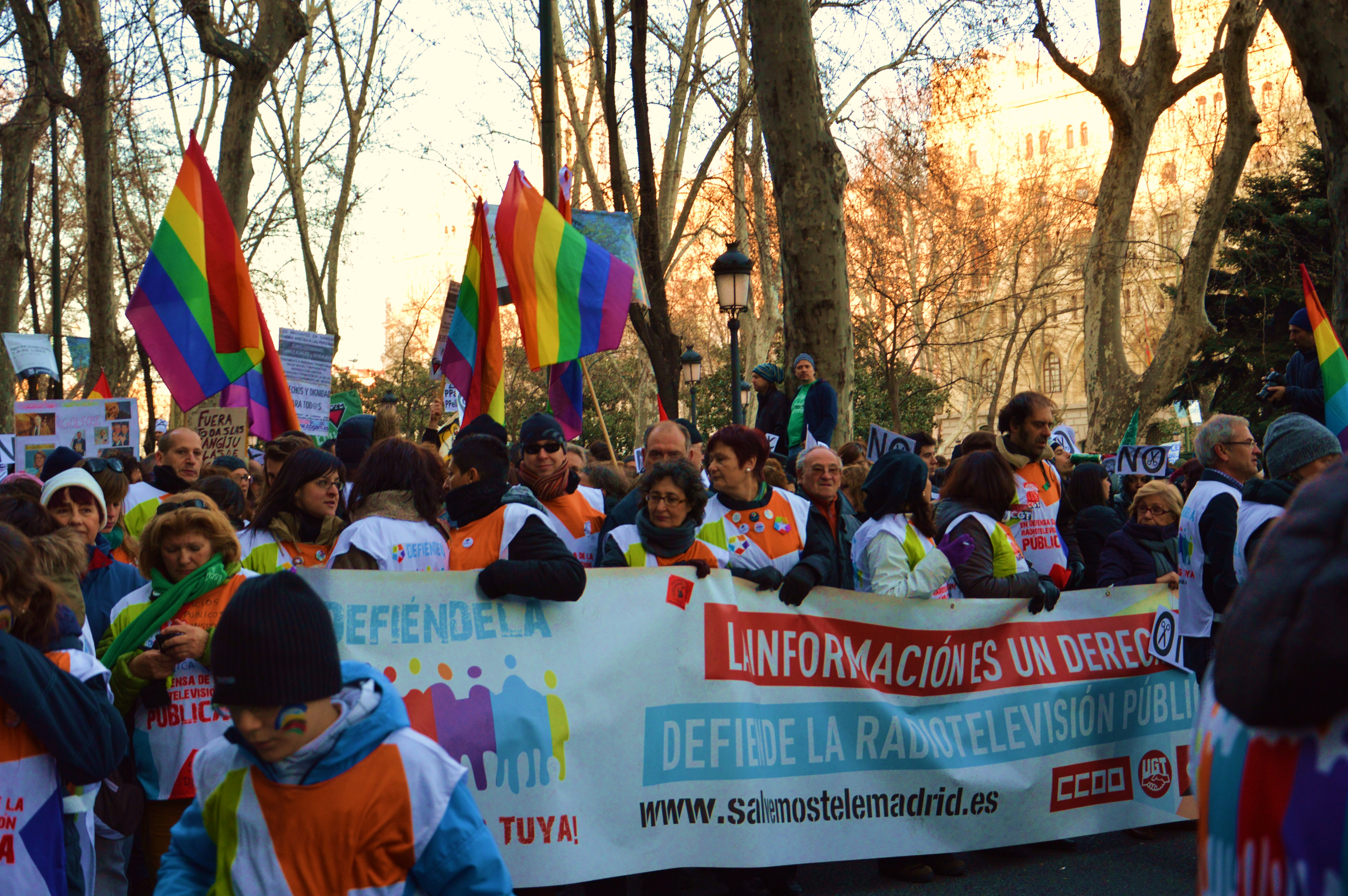 Trabajadores despedidos de Telemadrid durante la manifestación, entre otros colectivos